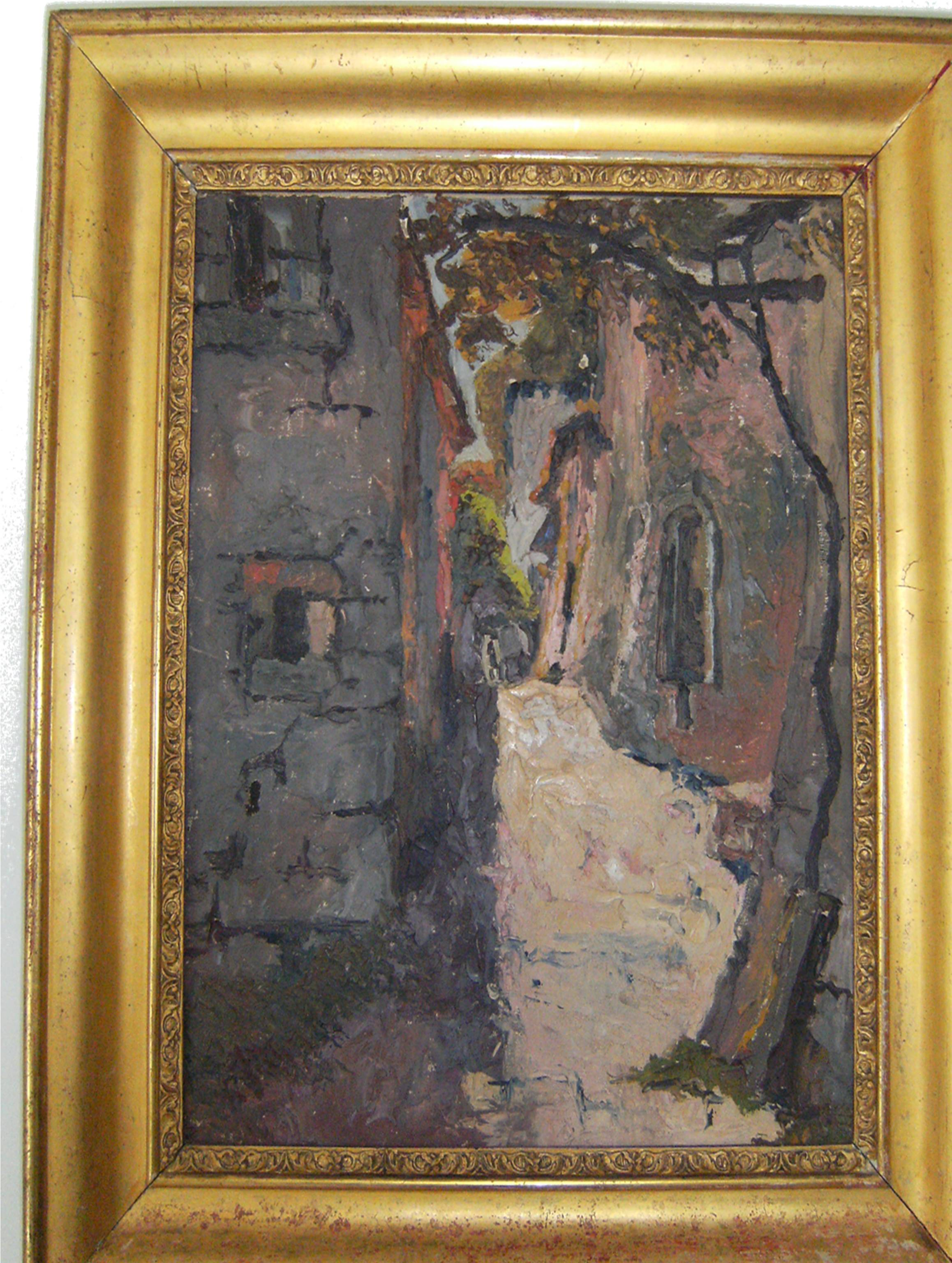 La Venelle par Jos Jullien, huile sur toile, vers 1910.